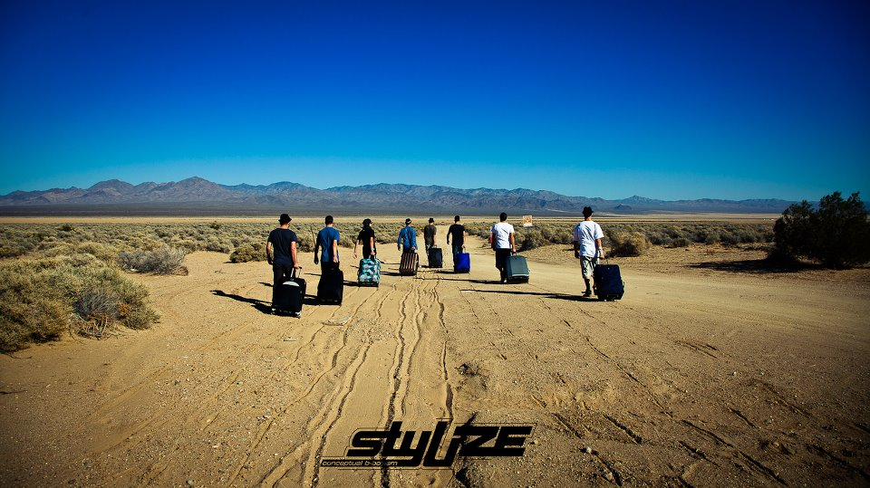 Stylize in Las Vegas, während eines Videodrehs